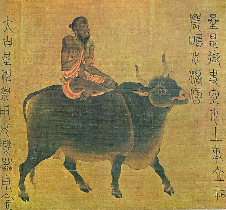 Attribué à Zhang Sengyou (début du VIe siècle). Copie du XIe ou XIIe siècle (?): La planète Saturne. Section du rouleau horizontal «Les cinq planètes et les vingt-huit constellations» - encre et couleurs sur soie. H. 27,5cm. Osaka Musée municipal. (ancienne collection Abe).